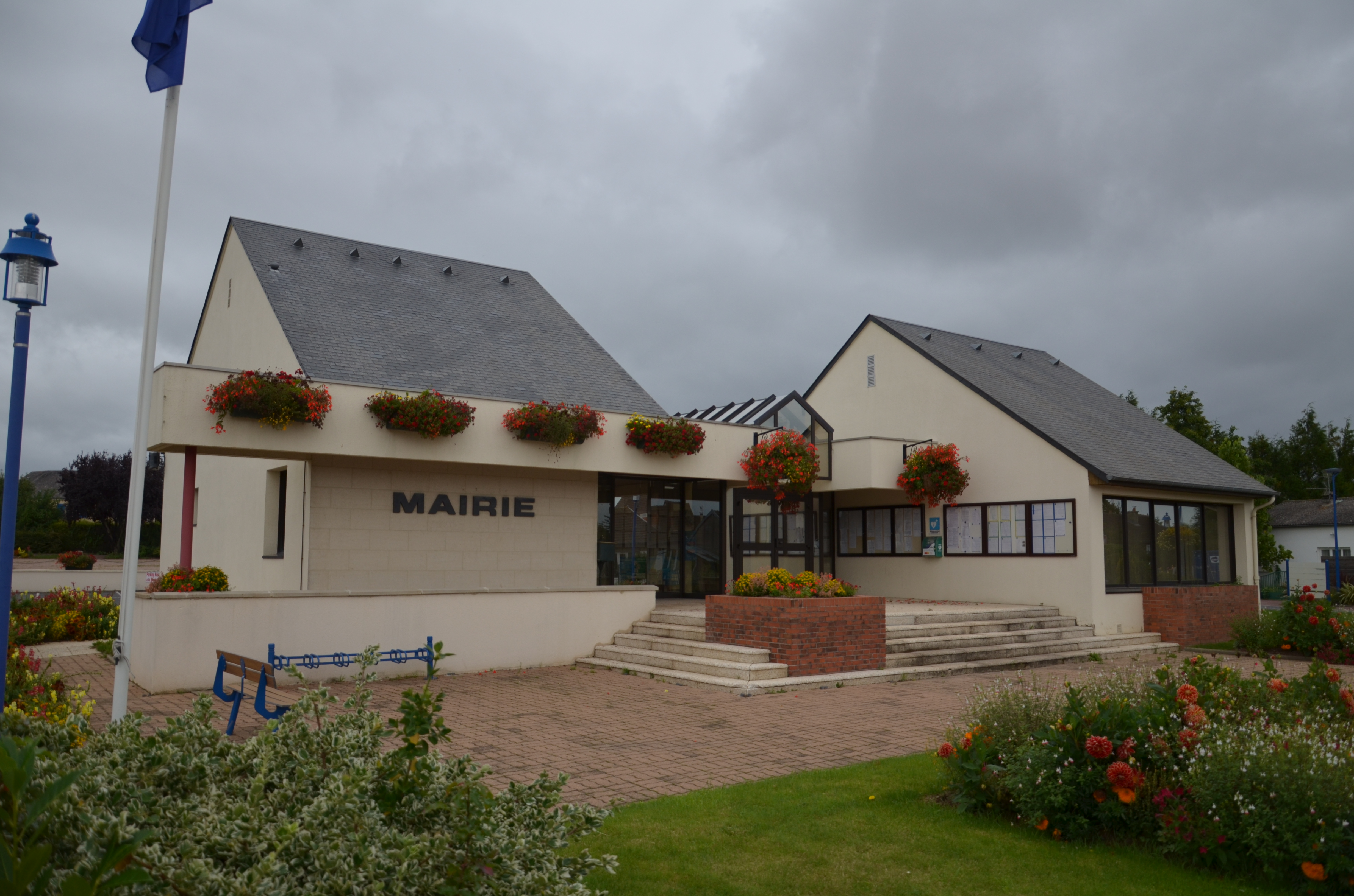 Mairie de Grentheville.